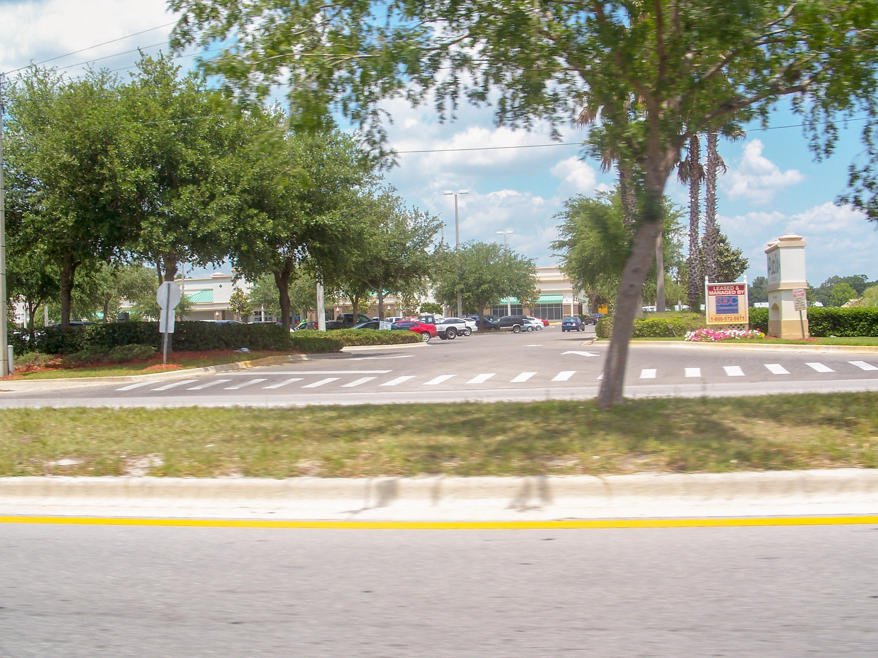 Jonesville, Florida: Shopping mall on SR 26